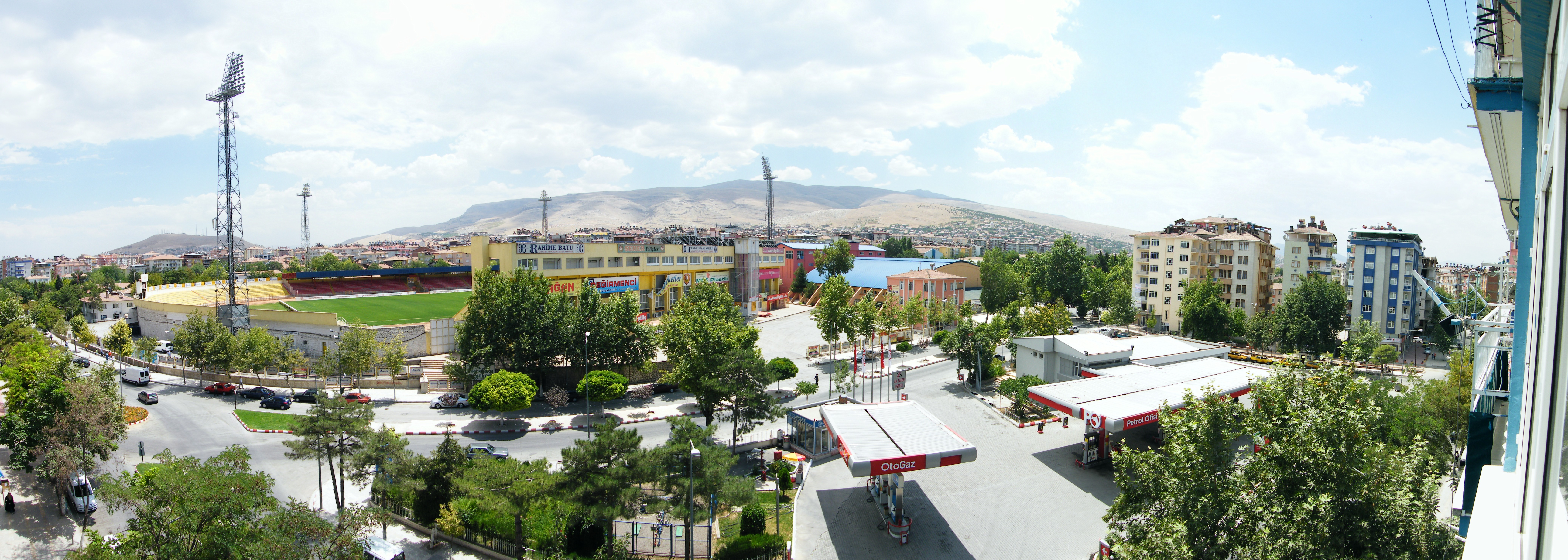 malatya inönü stadyum ile çevresi panorama